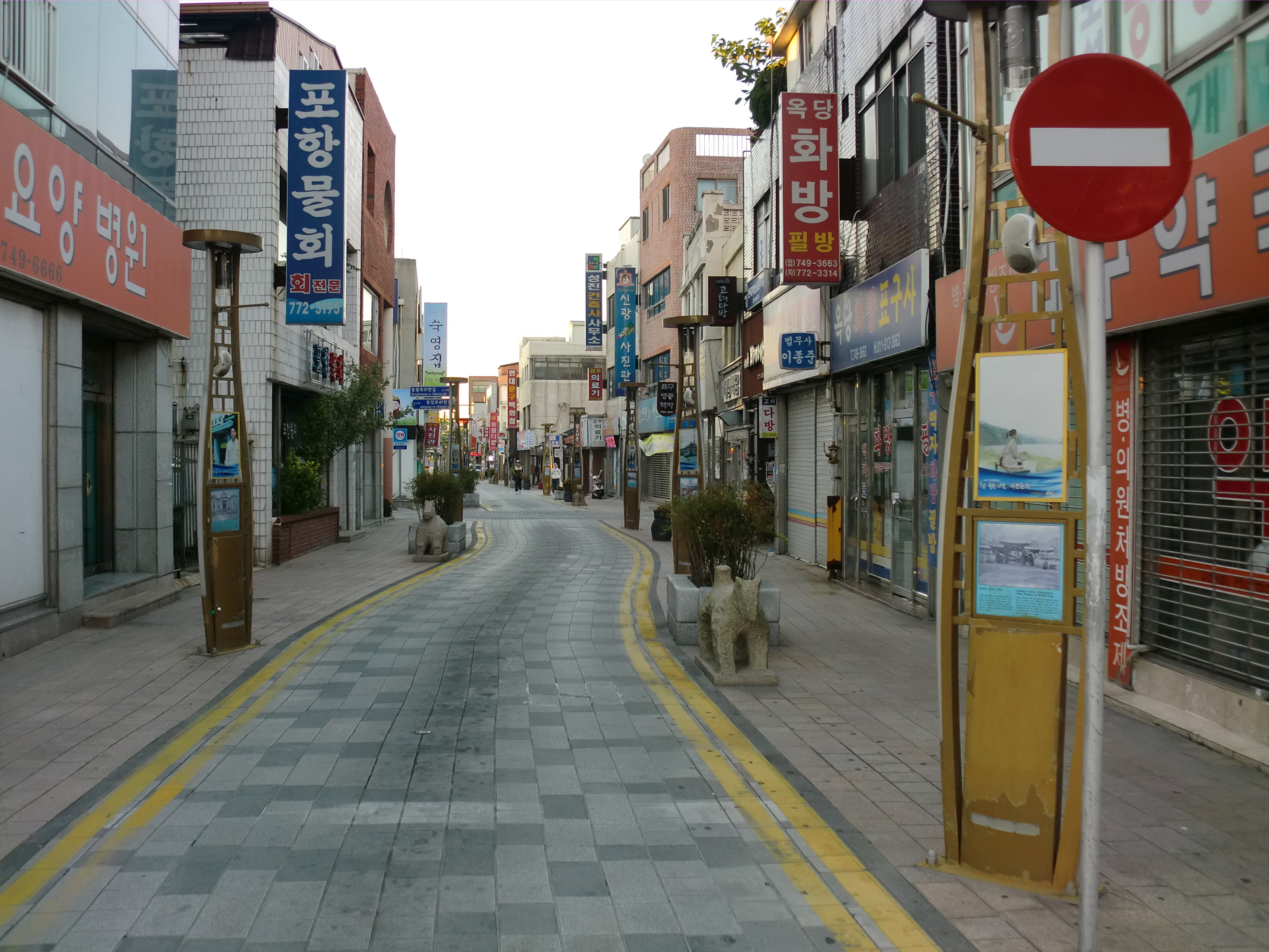 경상북도 경주시에 있는 봉화로문화의 거리